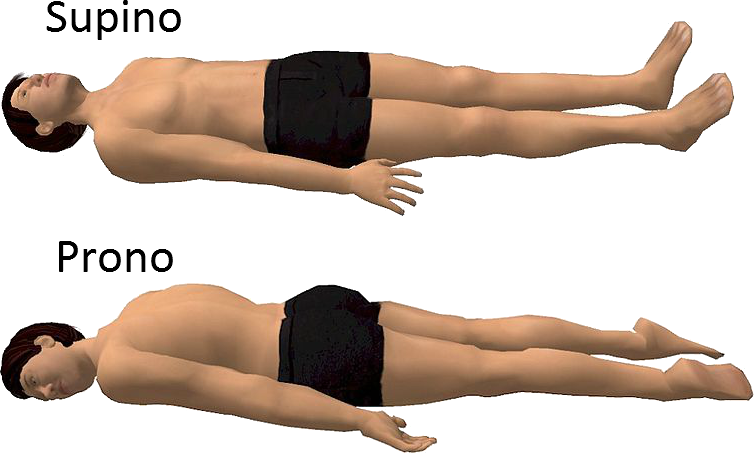 Posiciones de decubito